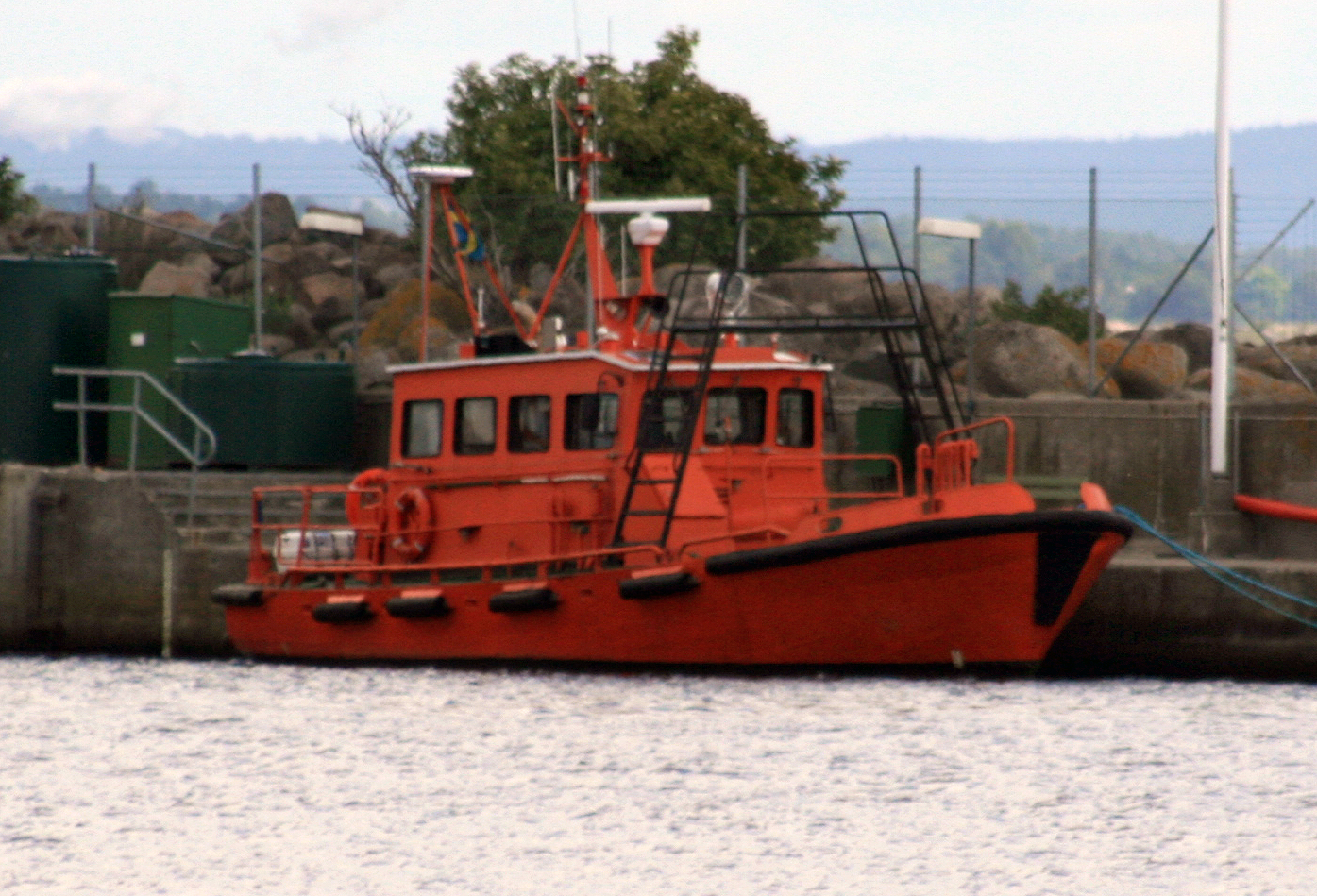 Pilot 771 SE i Åhus 16 juli 2008